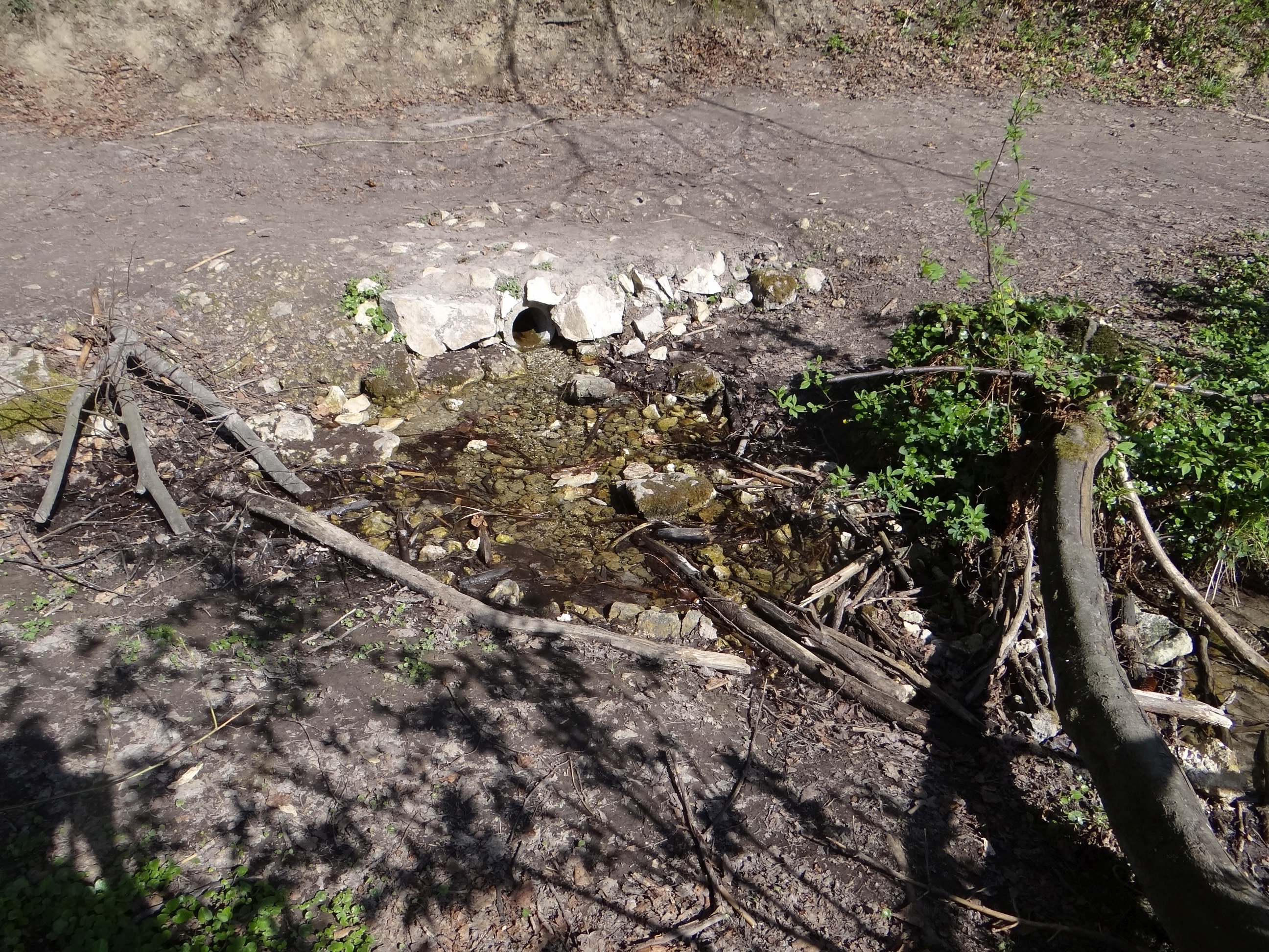 Źródło Filipowskiego w Dolinie Sąspowskiej w Ojcowskim Parku Narodowym